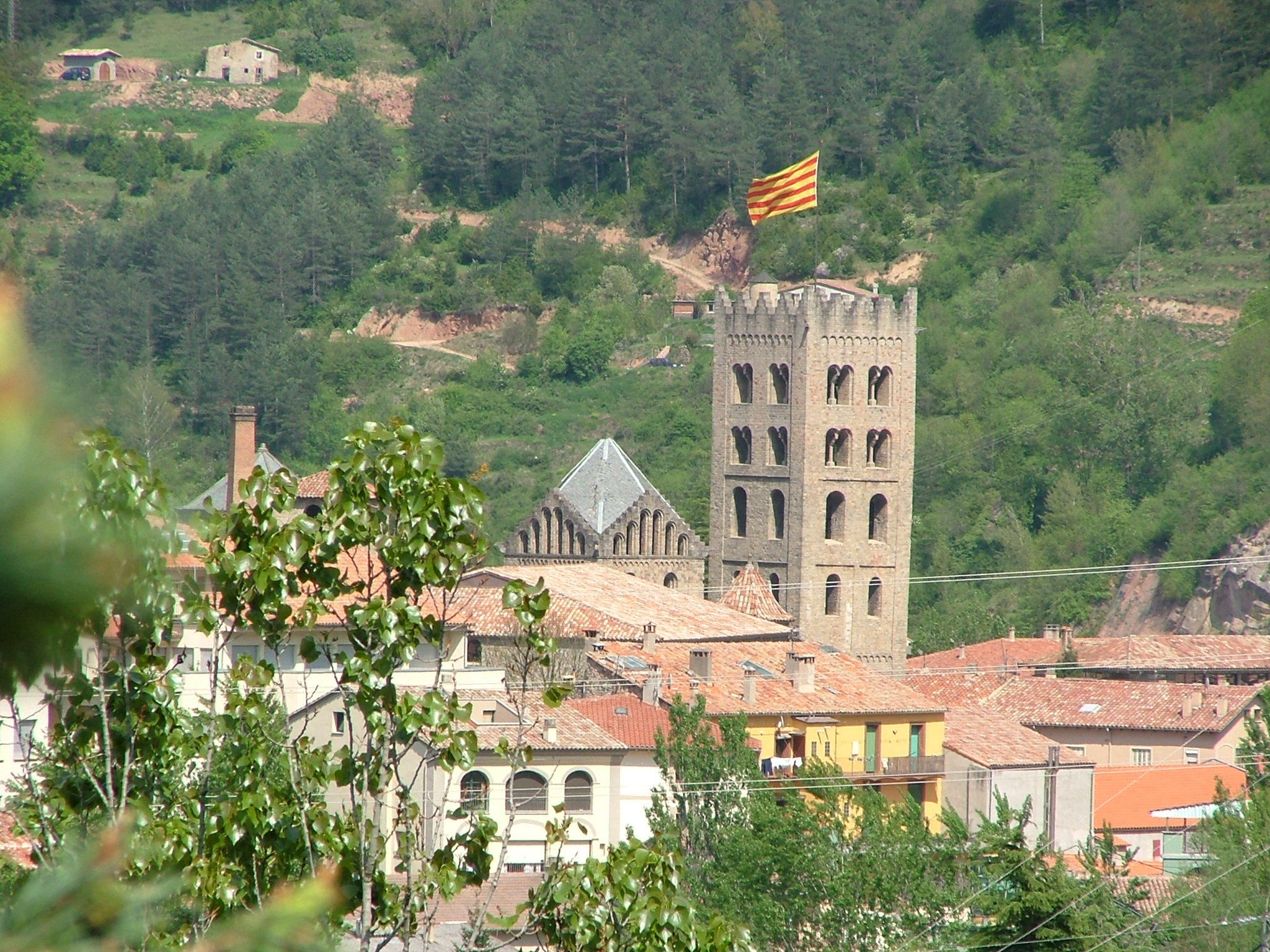 Ripoll, Catalunya, Spain